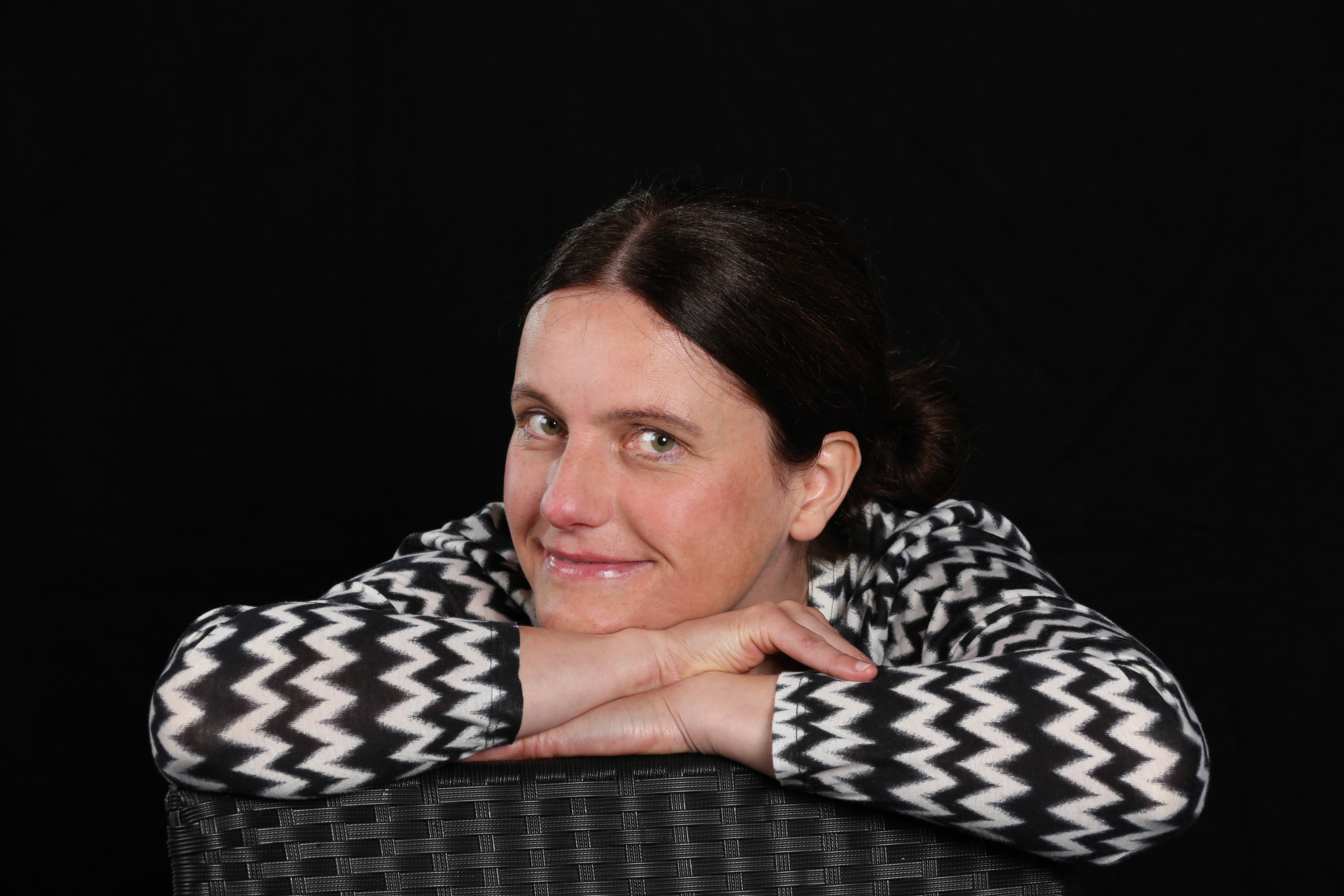 Die Autorin Katja Kamm bei der Frankfurter Buchmesse 2017